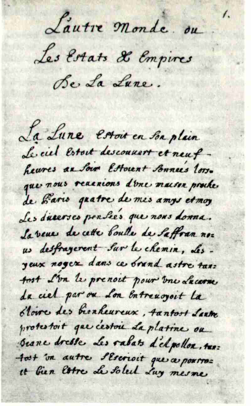 Manoscritto autografo de "L'altro mondo" di Savinien Cyrano de Bergerac (prima metà del XVII secolo).